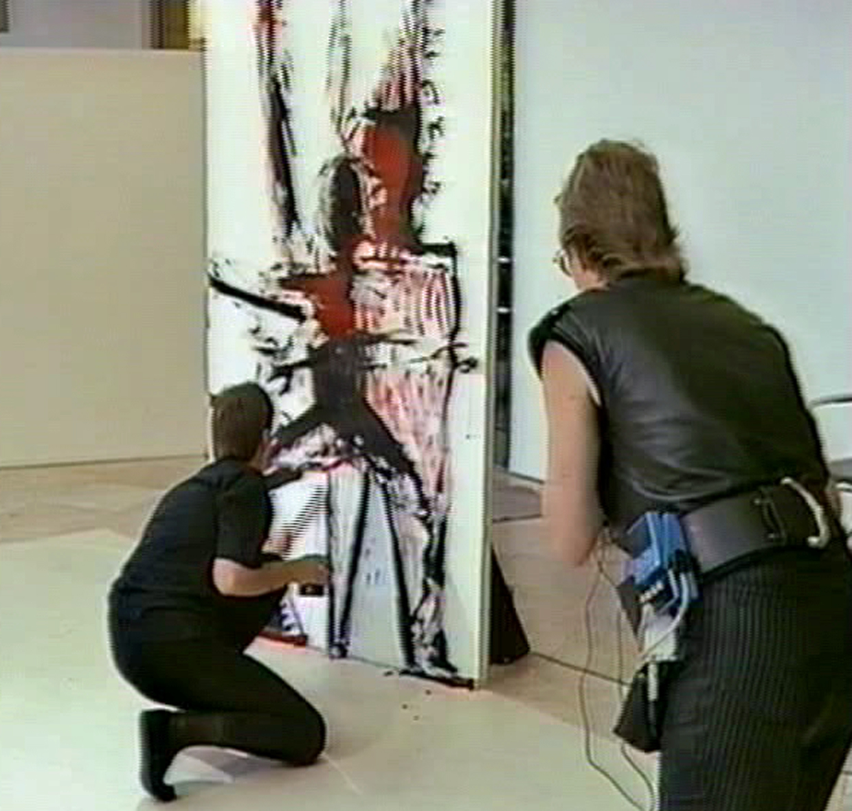 Im Rahmen der ZDF LIVE-KUNST in der Schirn-Kunsthalle, Frankfurt entstand das Selbstporträt im Dialog mit der Musikerin Annemarie Roelofs